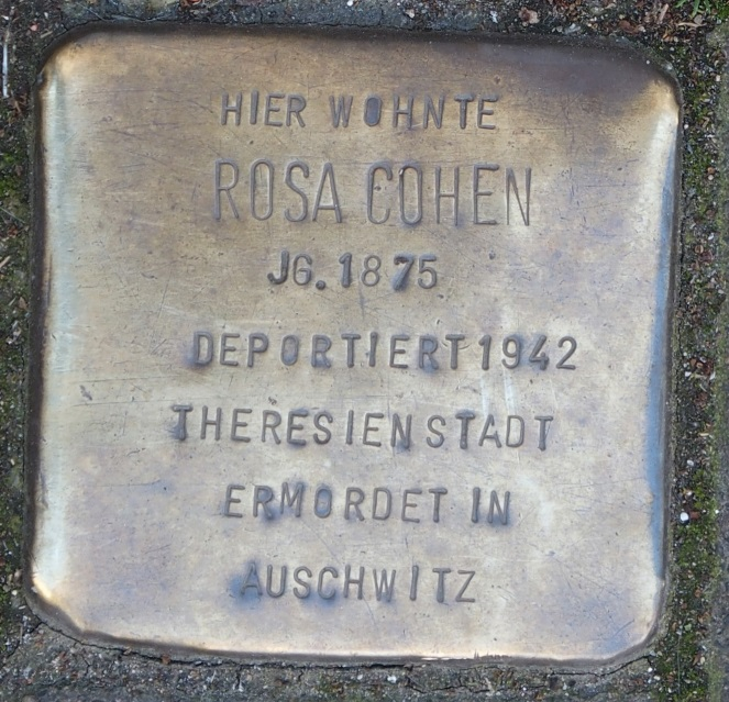 Stolperstein in Soest Jakobistraße 27, Rosa Cohen